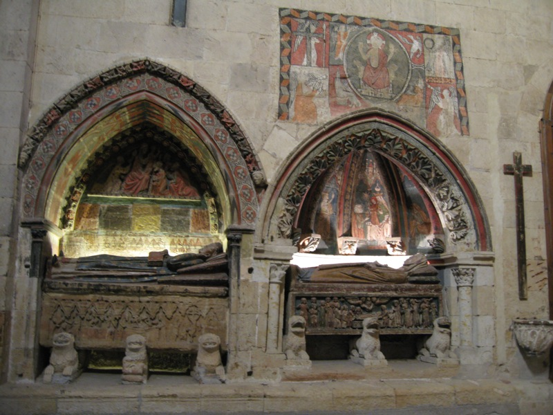 Sepulcros y pinturas murales en el brazo sur del crucero de la Catedral Vieja de Salamanca.